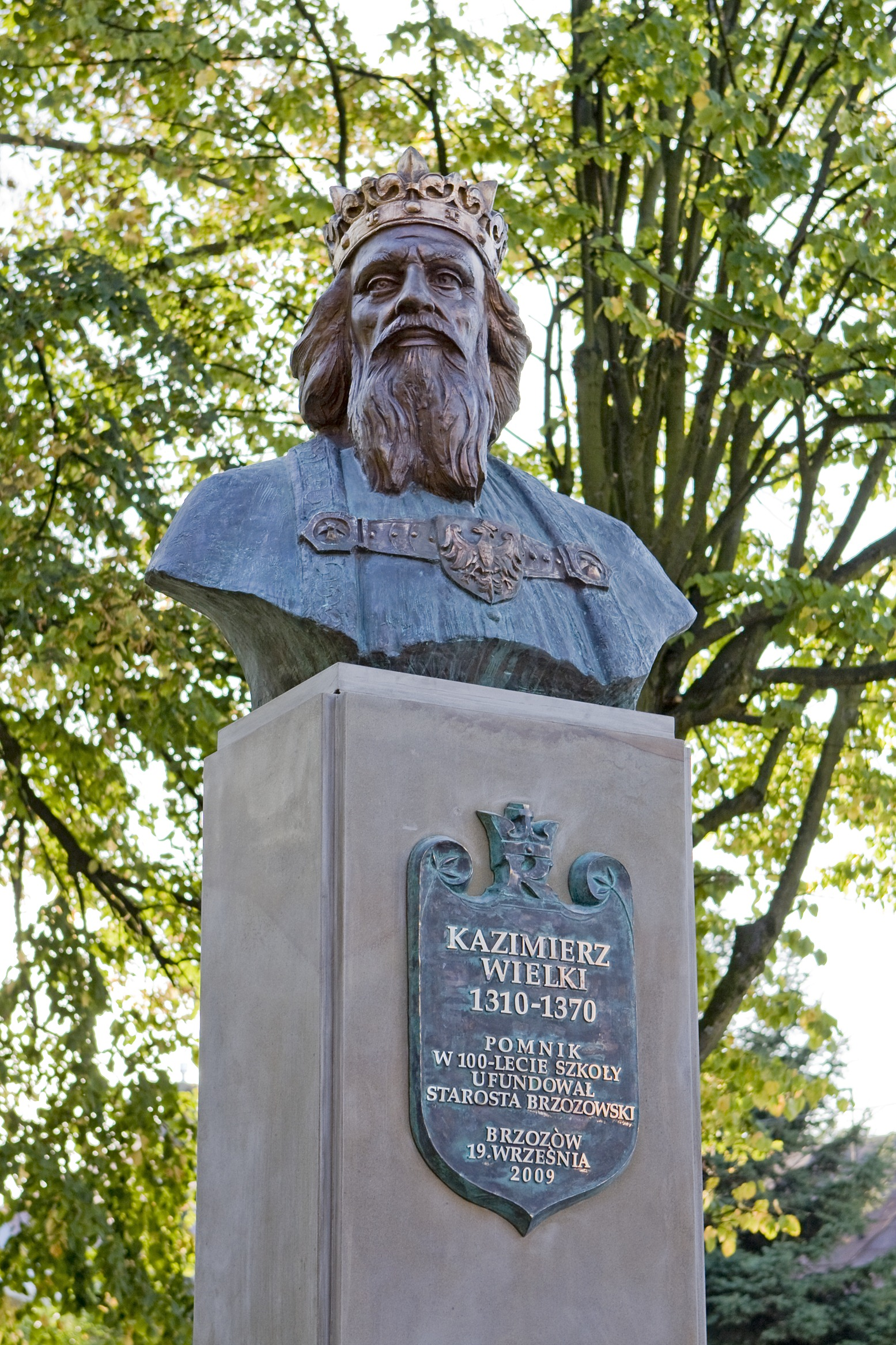 Pomnik króla Kazimierza Wielkiego przy Liceum Ogólnokształcącym w Brzozowie.